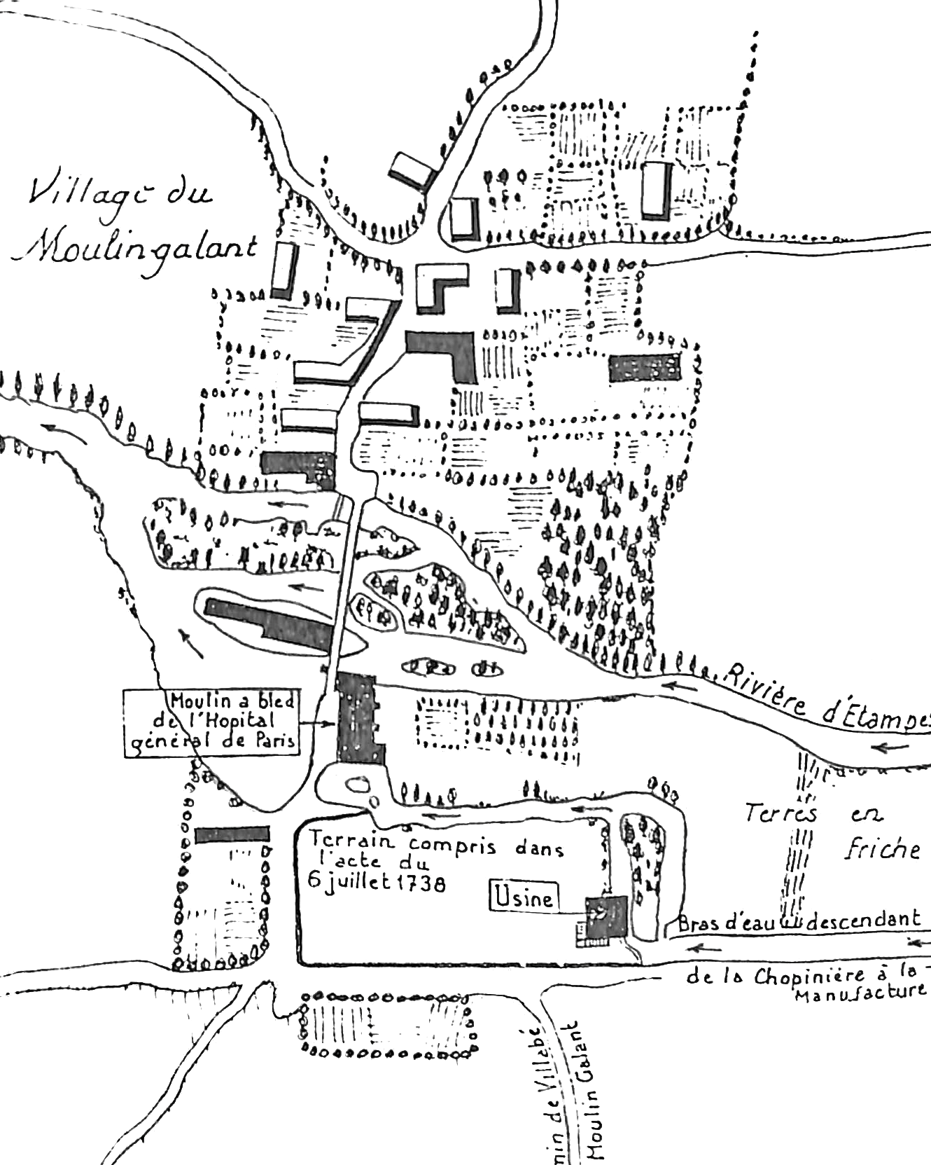 Plan du hameau de Moulin-Galant (Villabé). Croquis dessiné lors de la vente de la manufacture de cuivre en 1749.